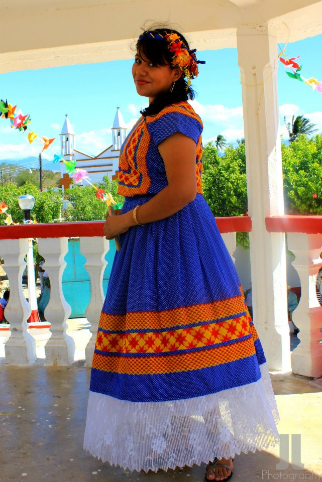 Vestimenta de juchiteca fotografia de Jorge Luis de los Santos Trujillo